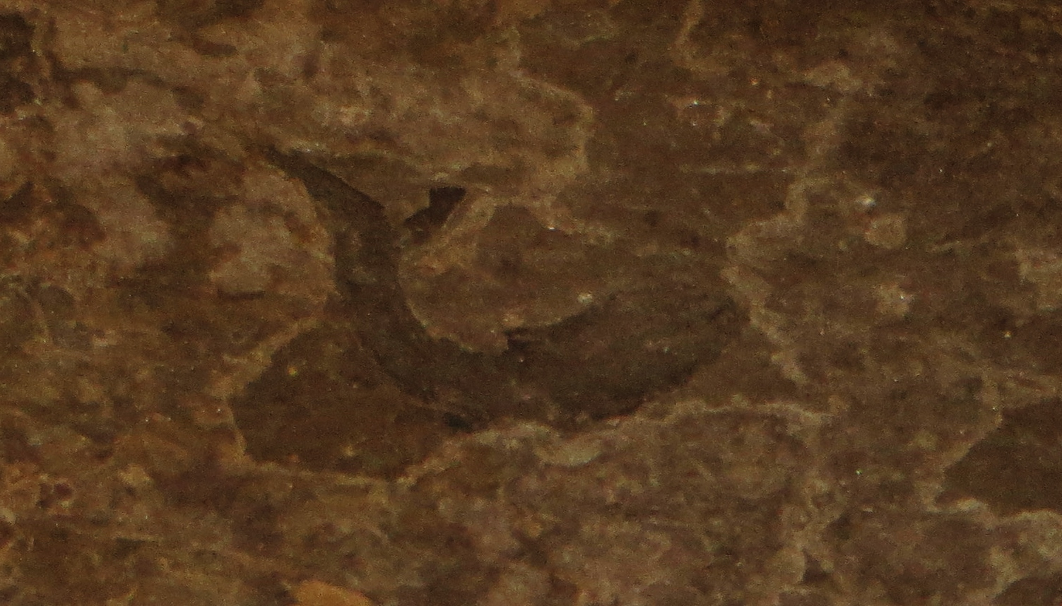 Fossil of Loganellia - Took the picture at Museon, Den Haag